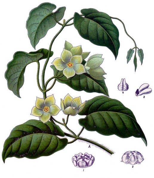 Condurangorindenstrauch. A blühendes Zweigstück von Gonolobus viridiflorus R. et S. in natürl. Grösse; 1 Nektardrüsen und Staubgefässe, vergrössert; 2 Staubgefässe, desgl.; 3 Pollinarien, desgl.; 4 Stempel, desgl. Die Nebenfiguren 1—4 gehören zu Gonolobus hispidus Hook, et Arn.